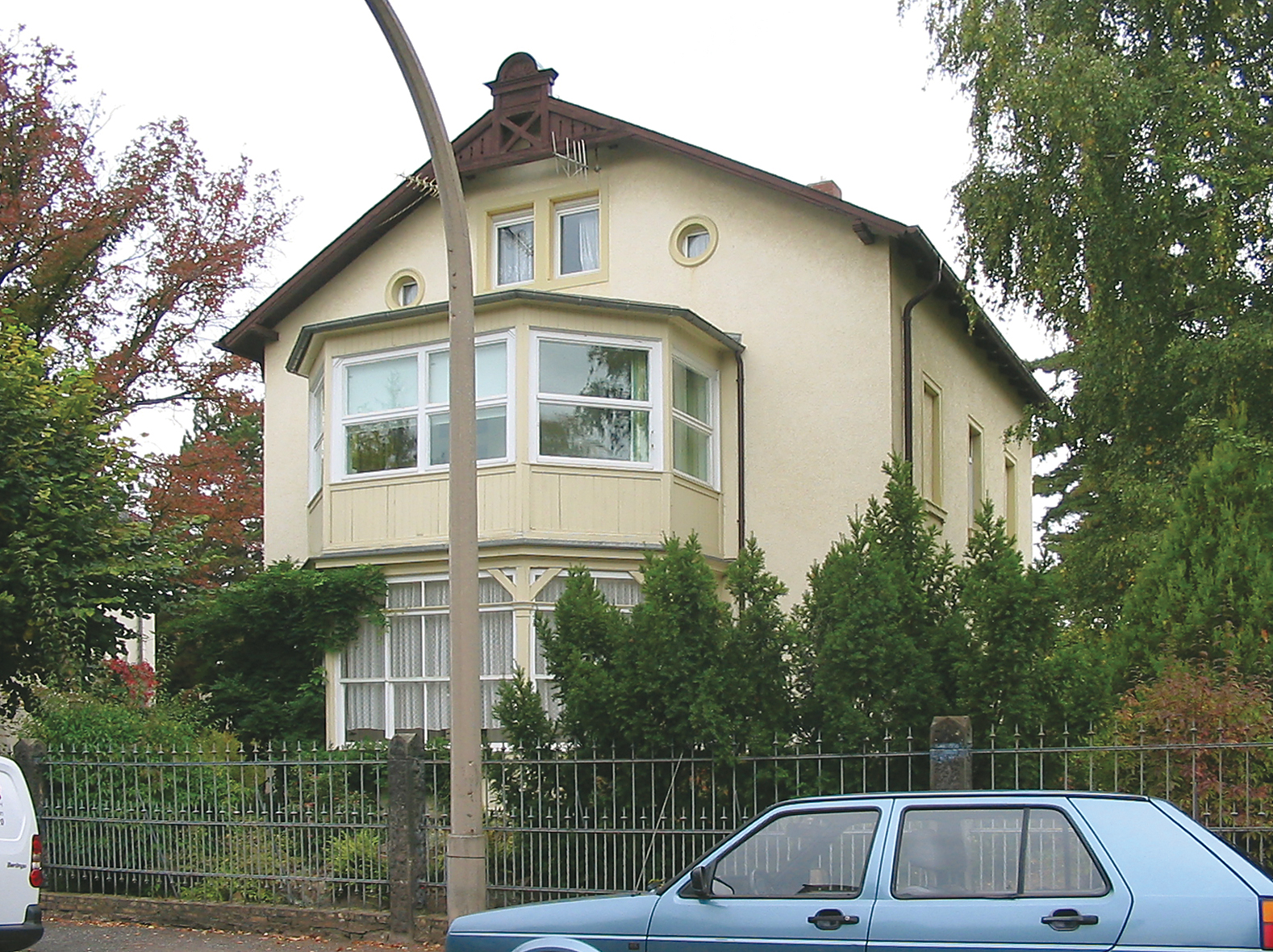 Radebeul, Villa Dr.-Schmincke-Allee 17